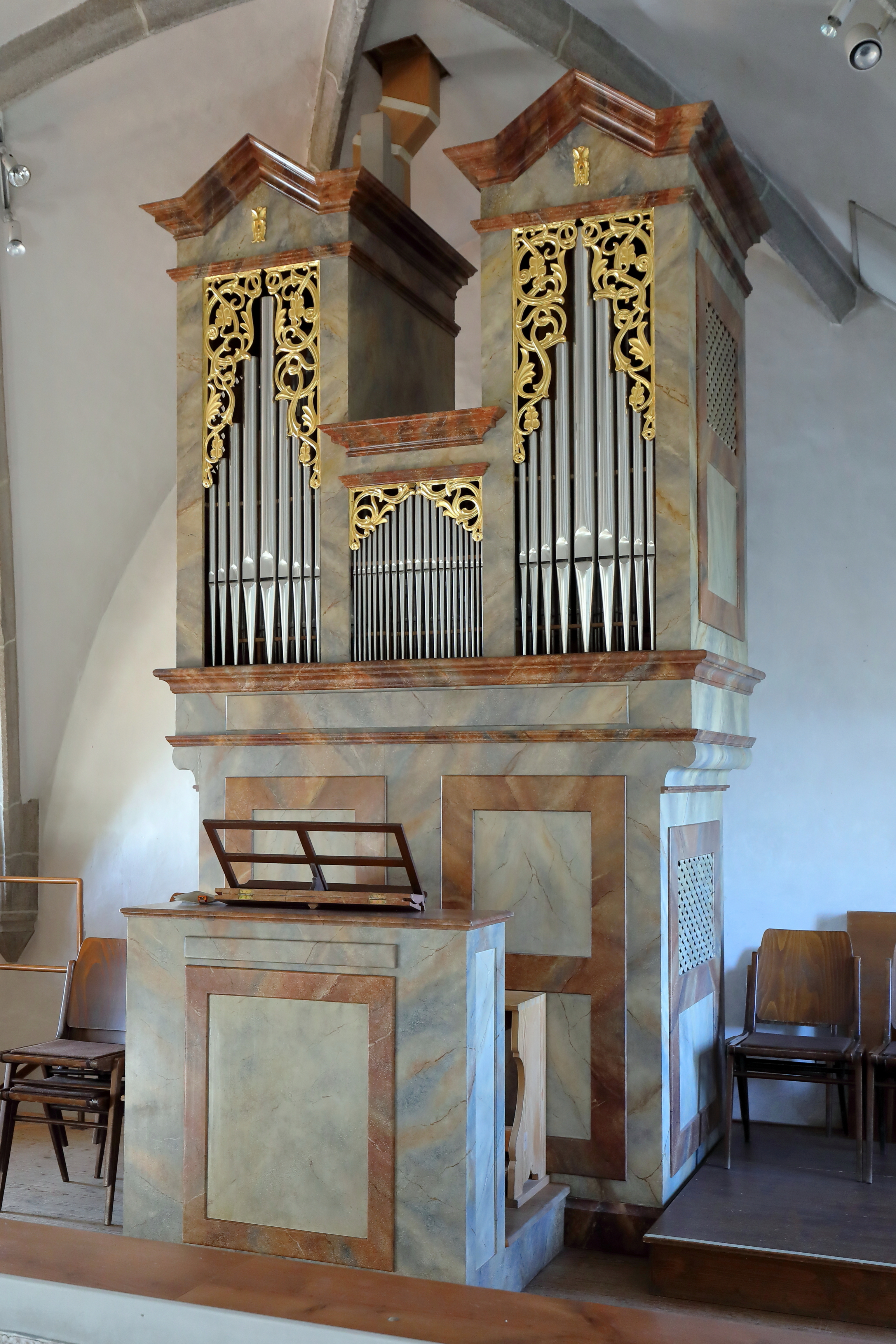 Orgel der röm.-kath. Pfarrkirche hl. Johannes der Täufer in der oberösterreichischen Gemeinde Arbing.Die Orgel wurde ab 1858, nach heutigem Wert um umgerechnet 82.738 Euro, von Josef Breinbauer errichtet und 1861 in Betrieb genommen. Am 8. Februar 1918 mussten die originalen Prospektpfeifen ans Kriegsministerium abgegeben werden und im Jahr 1927 ergänzte der Orgelbauer Josef Panhuber die Orgel mit 39 neuen Zinkpfeifen. Nach rund 30 Jahre Spielpause wurde die siebenregistrige Orgel Anfang der 2000er Jahre renoviert und am 4. Juni 2004 durch Diözesanbischof Maximilian Aichern wieder geweiht.